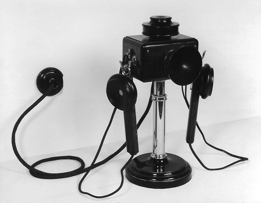 Telefon, Tischapparat in Ständerform mit Körnermikrofon, ca 1889, Foto aufgenommen 1963-10-01